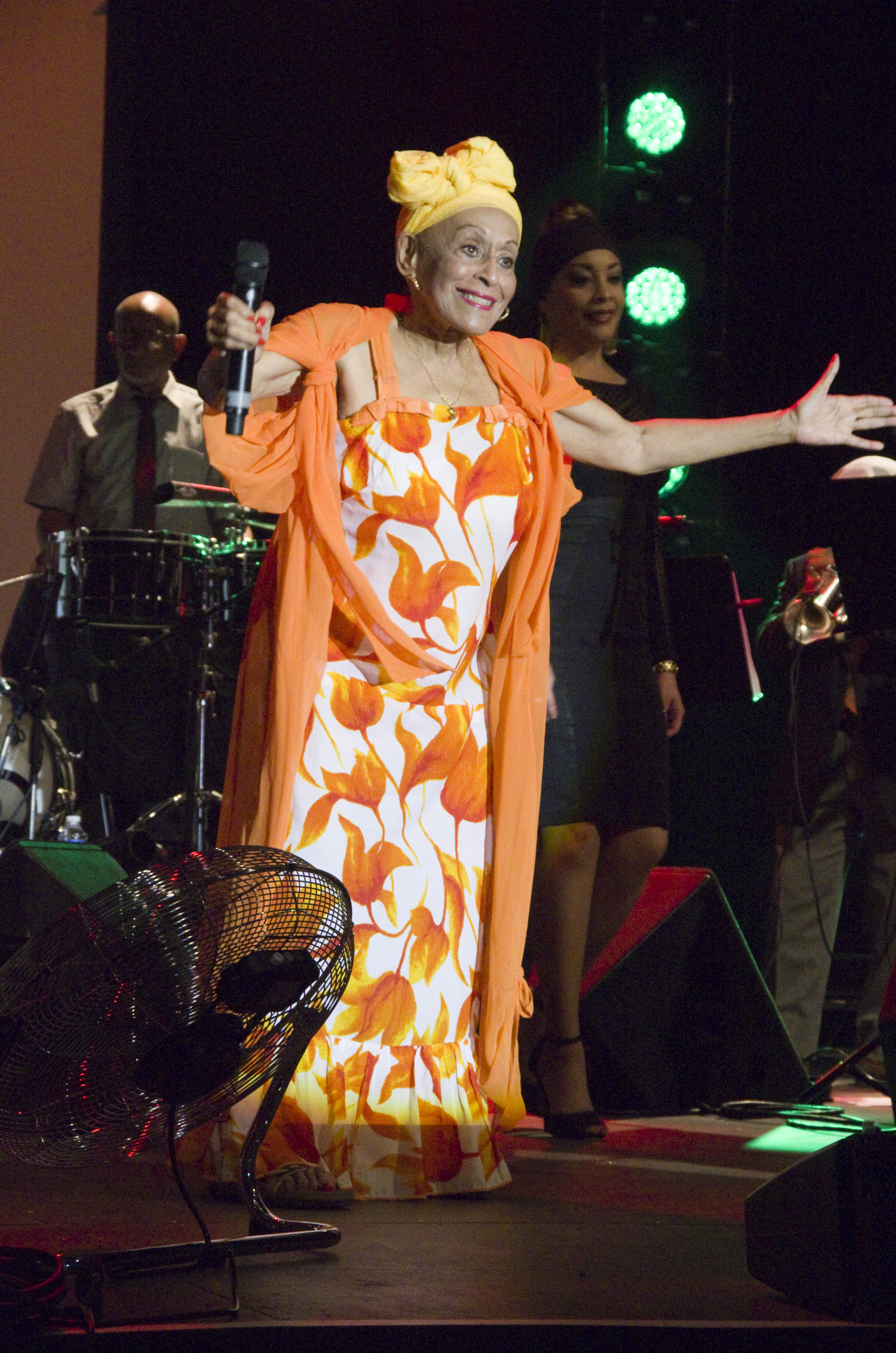 Das Zelt-Musik-Festival 2015 in Freiburg im Breisgau. 06.07.2015 Orquesta Buena Vista Social Club Omara Portuondo